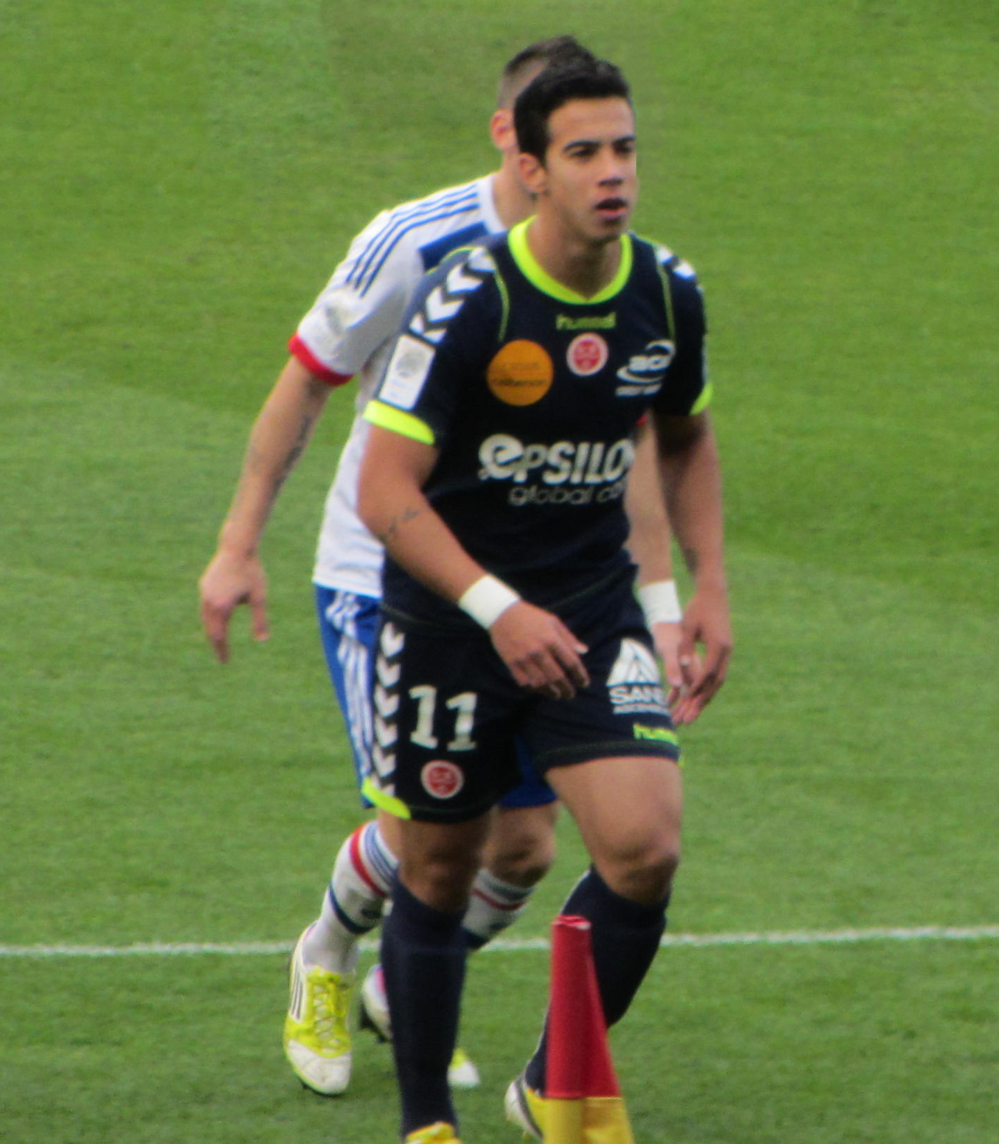 Diego Olympique Lyonnais-Stade de Reims